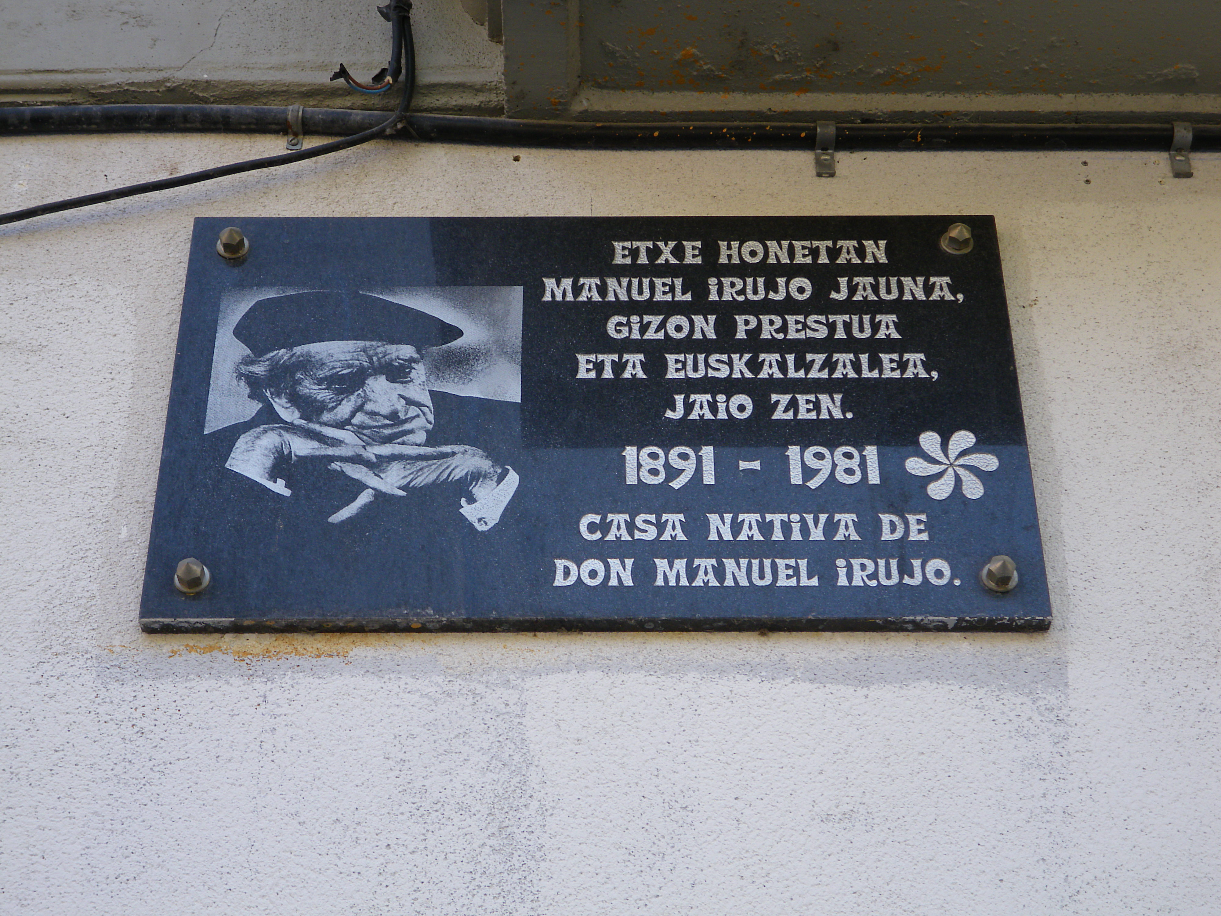 Manuel Irujo Ollo jaunaren jaiotetxean kokaturiko oroitarria, Done Jakue enparantza, Lizarra, Nafarroa, Euskal Herria.